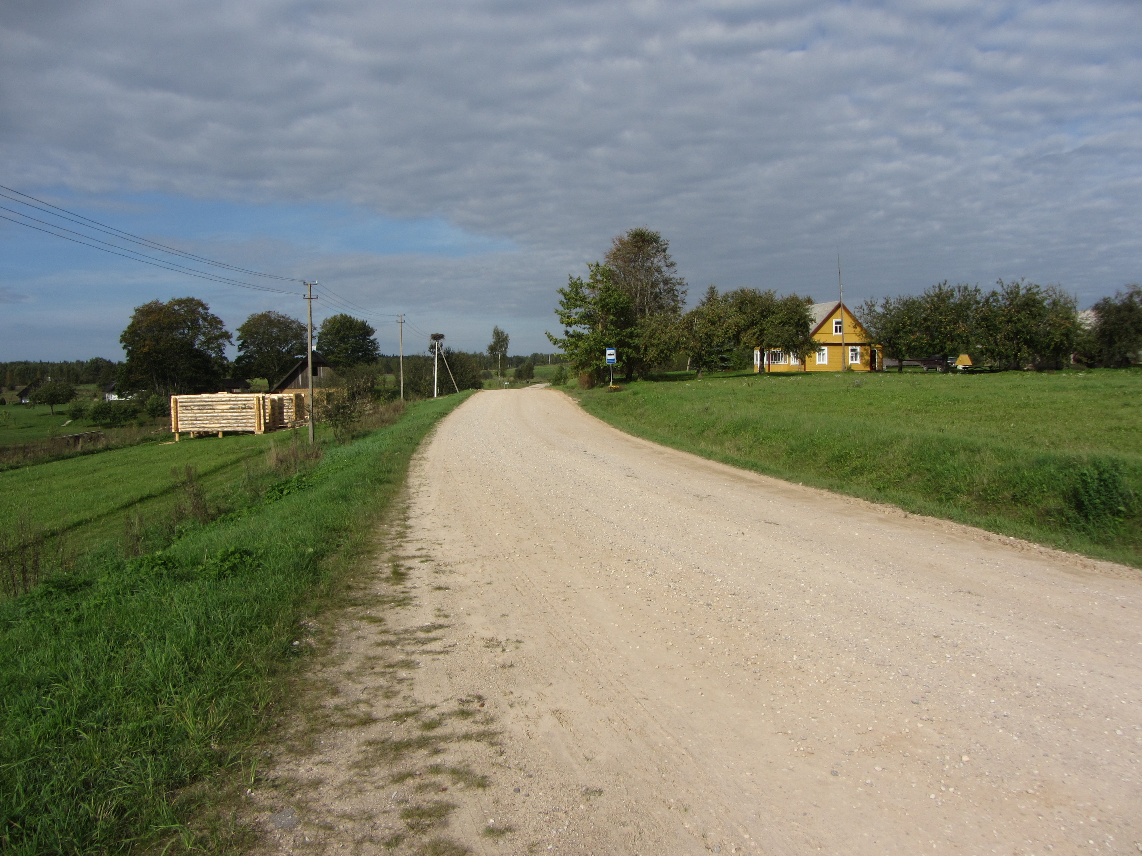 Ažvinčiai, Lithuania